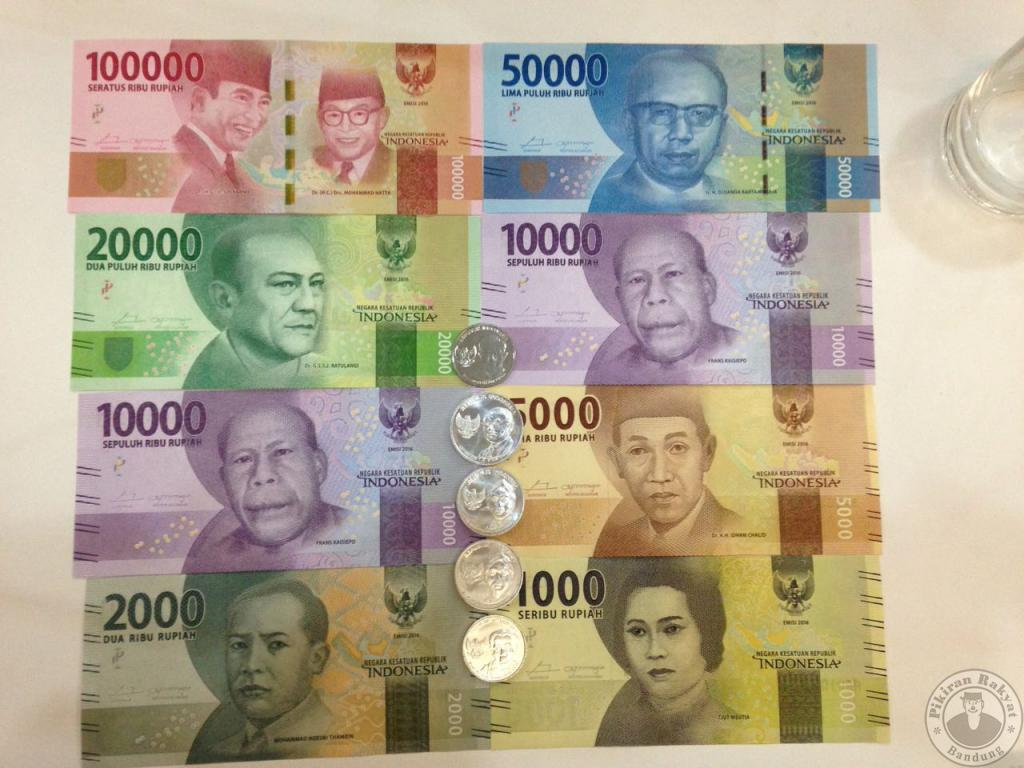 a